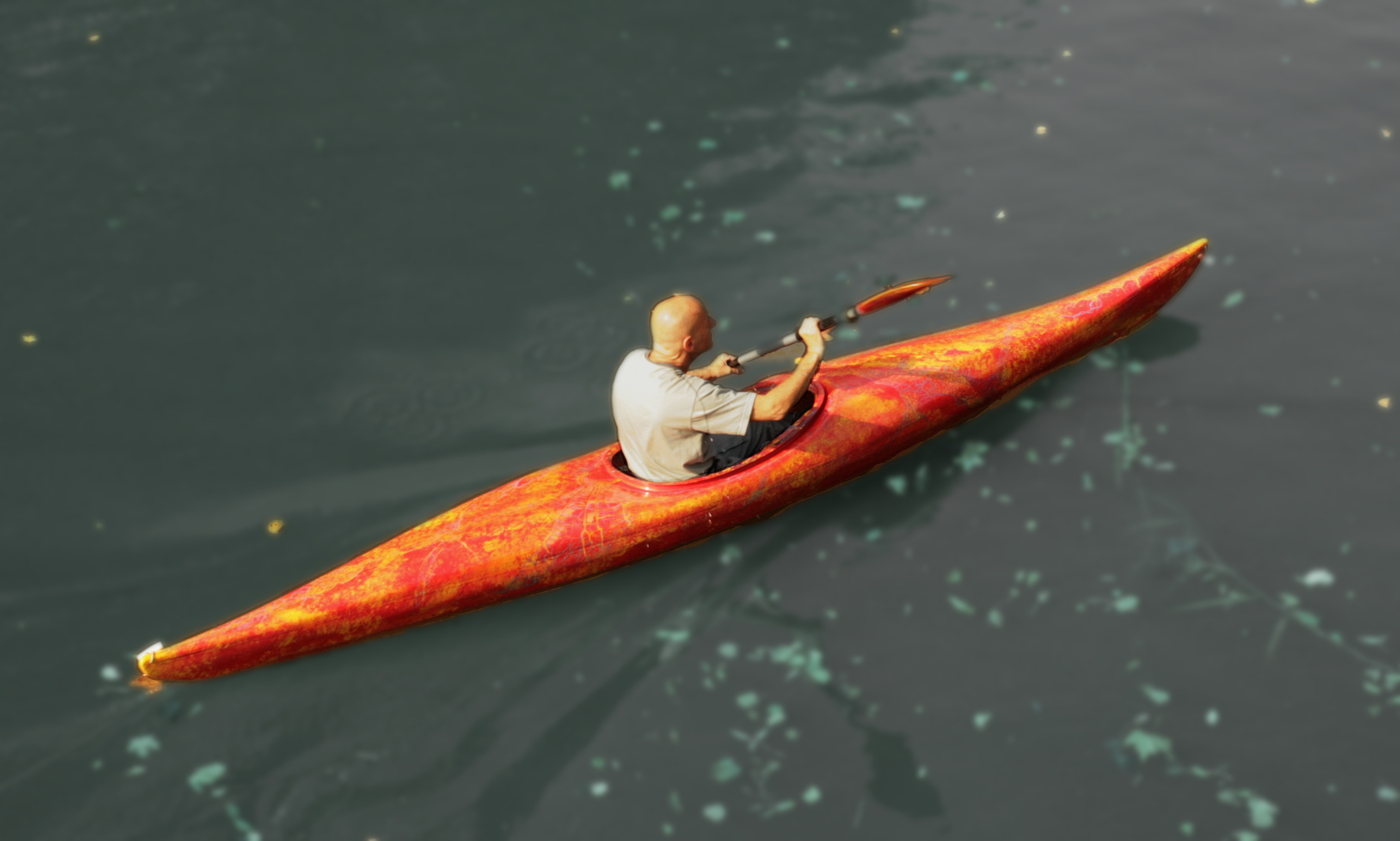 A man in a kayak